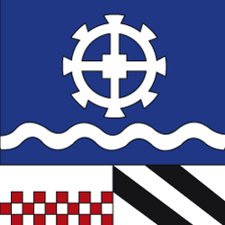 Flag of Oberuzwil, Canton of St. Gallen - Flago de Oberuzwil, Kantono de Sankt-Galo